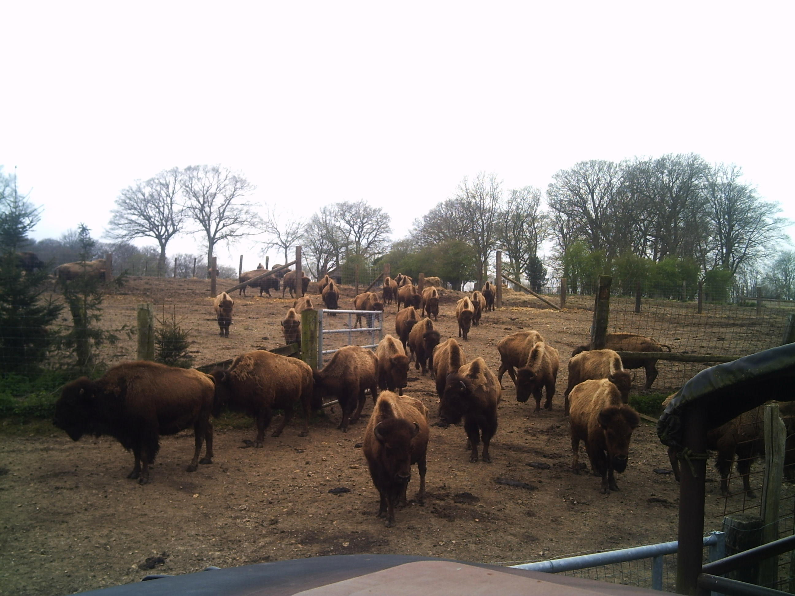 Troupeau de bisons américains (ferme des bisons de Muchedent - Seine-Maritime)